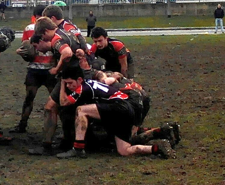 Gaztedi (erdian) eta Universitario Bilbo (ezkerrean) klubetako 18 urtez azpiko taldeetako errugbi jokalariak, elkarren aurkako partidako bigarren denboran, Lakuako (Gasteiz) errugbi zelaian, 2016ko otsailaren 13ko 14:32an